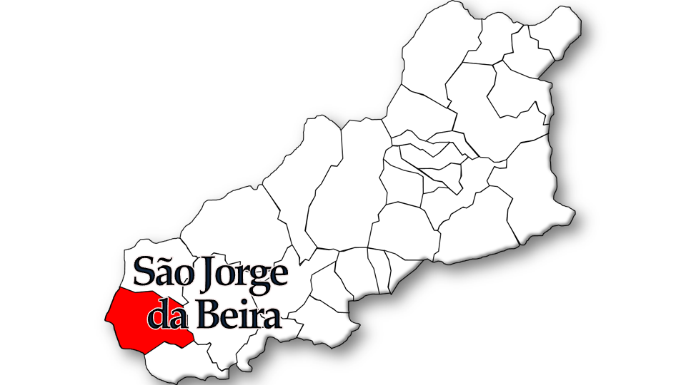 População